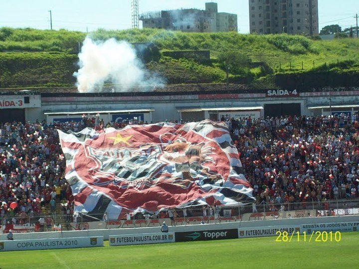 Estádio de futebol pertencente ao Paulista Futebol Clube da cidade de Jundiaí-SP